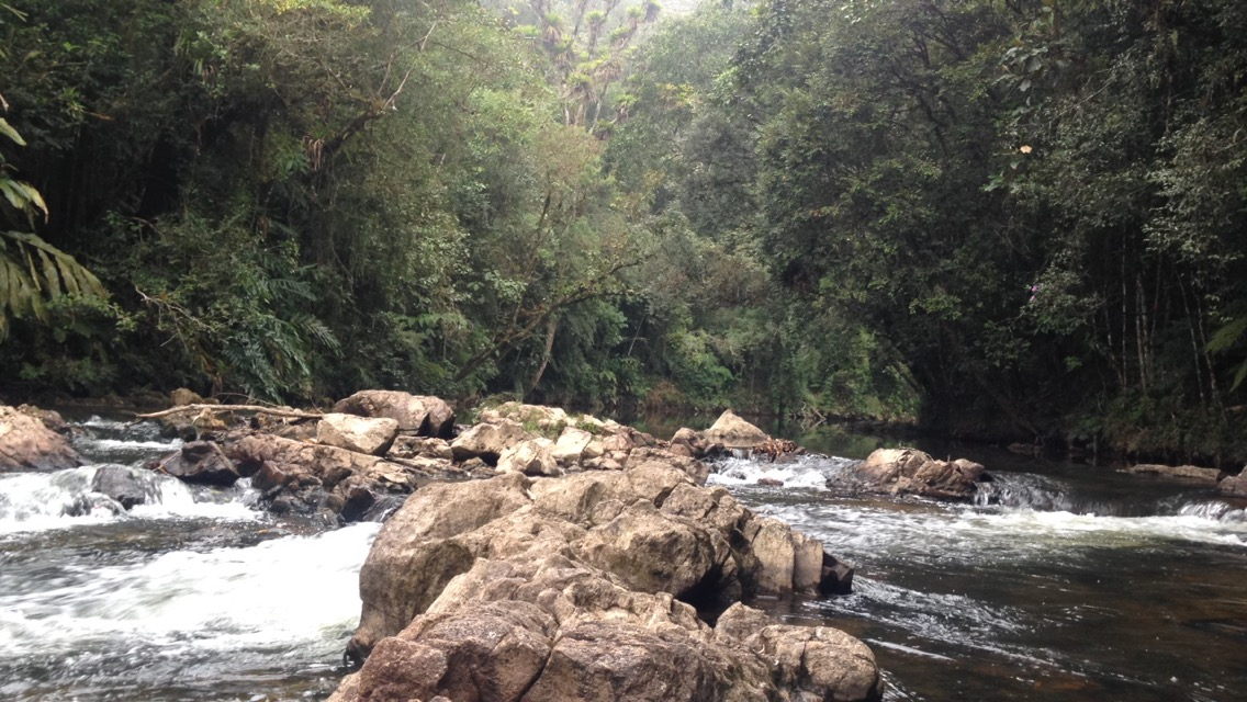 cachoeira próxima a estrada do marsilac